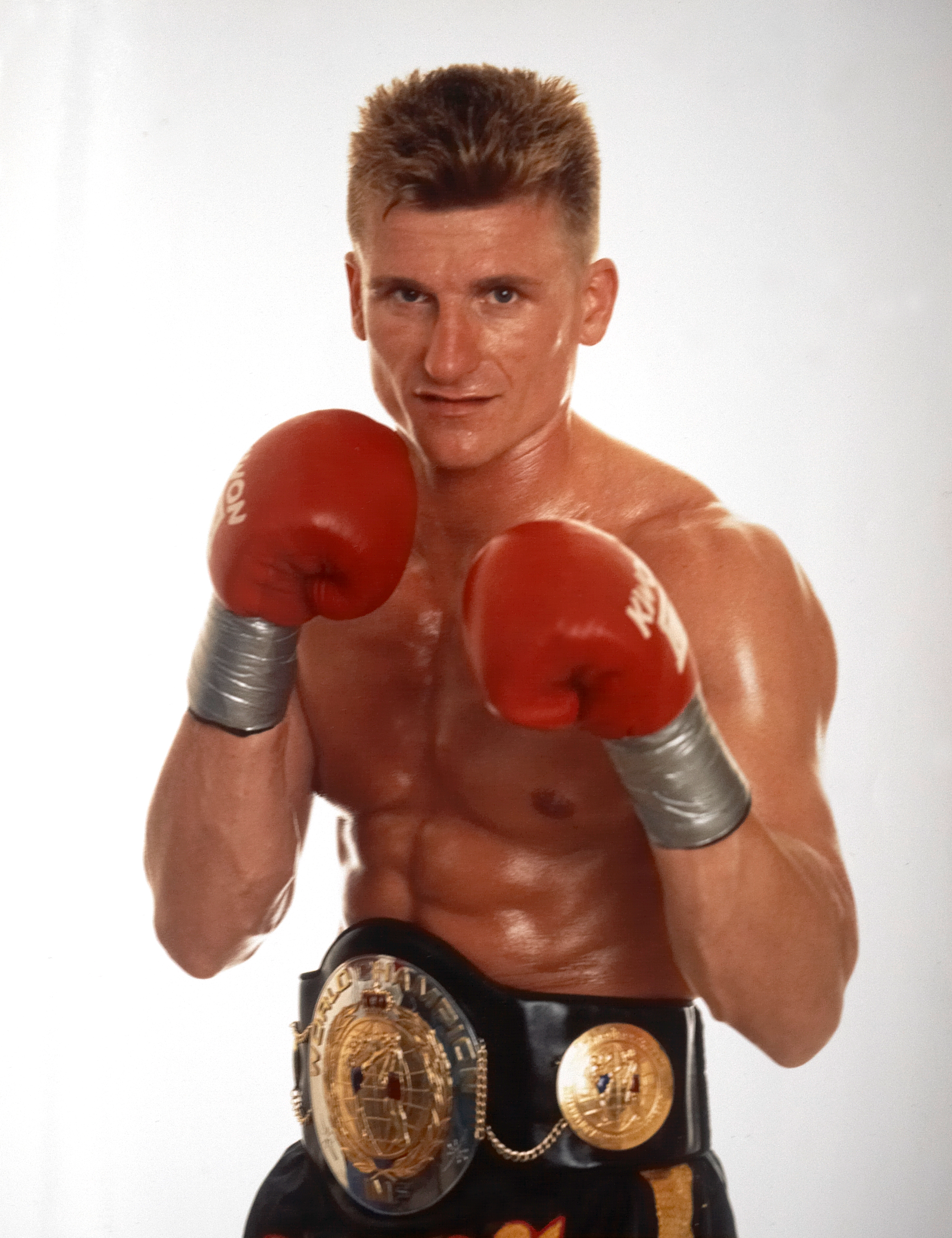 Günter Singer as IMF World Champion Kickboxer